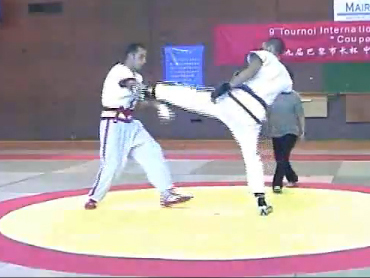 Tecnica di calcio durante un combattimento sportivo di Shou Bo